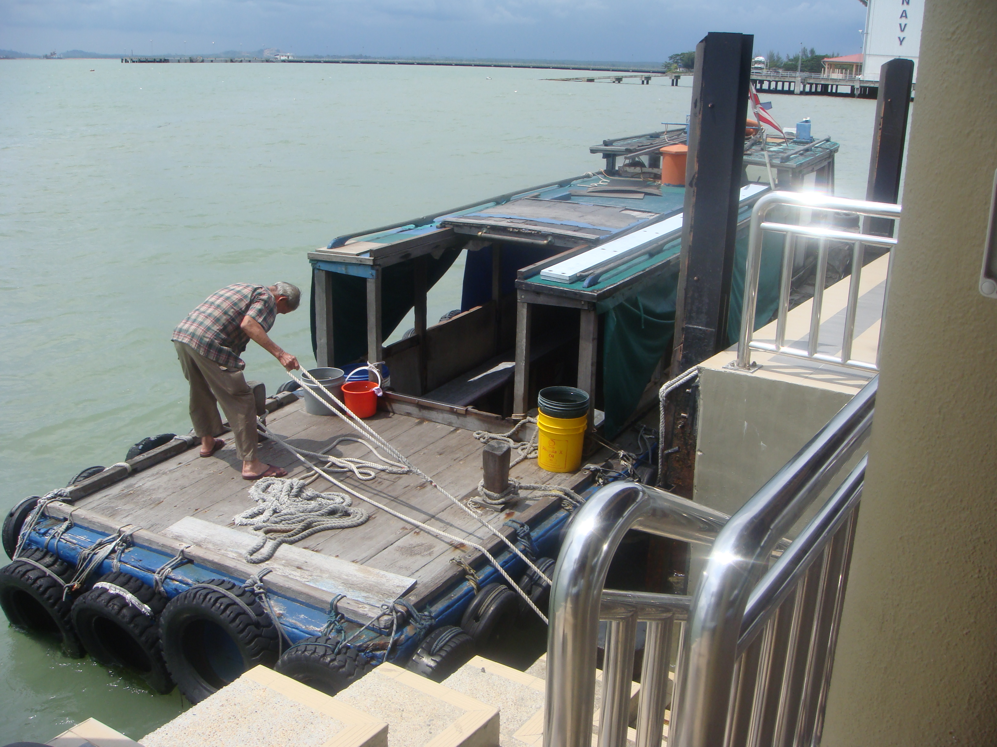 タンジュン・プングリ桟橋に接岸中のBumboat